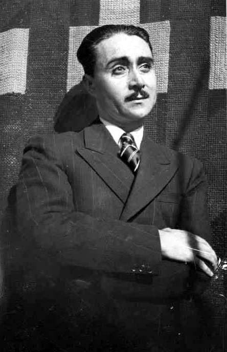 Poeta chileno Óscar Castro (1910-1947).